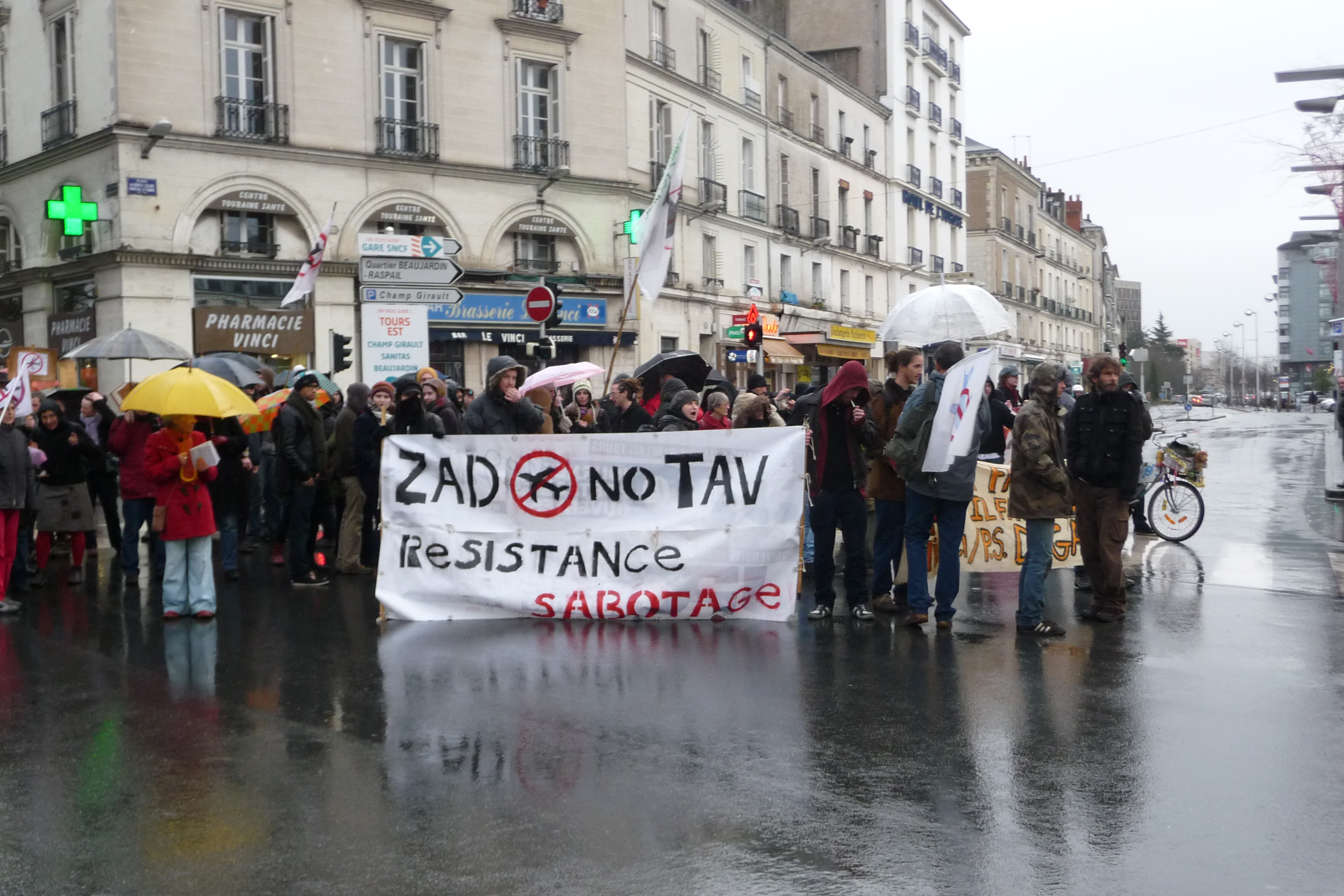 Manifestation à Tours, le 15 décembre 2013, en soutien à la ZAD (Zone d'aménagement différé) et contre l'aéroport de Notre-Dame-des-Landes (NDDL). Participation d'une centaine de personnes.